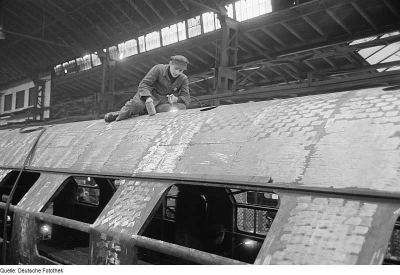 Original image description from the Deutsche Fotothek Schweißarbeiten an einem Doppelstockwaggon